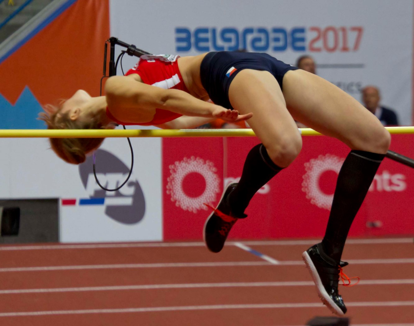 072 finale hoog hruba